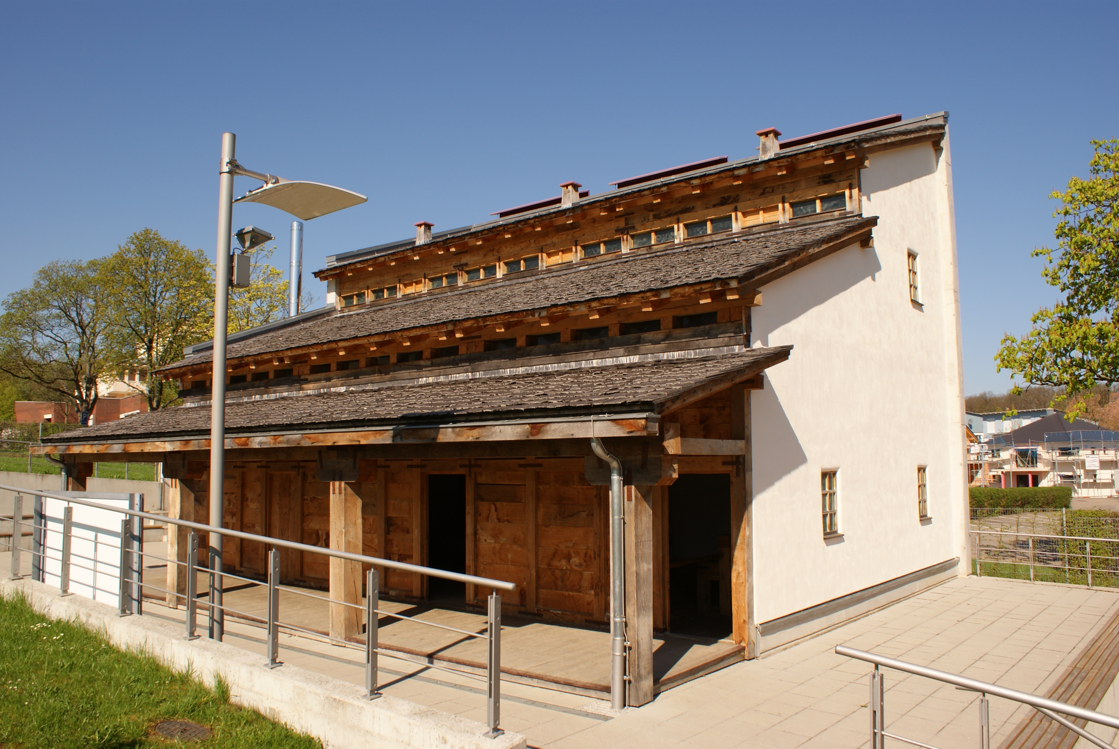 Limesmuseum Aalen. Rekonstruierte Mannschaftsbaracke. Mit freundl. Genehmigung des Museums.